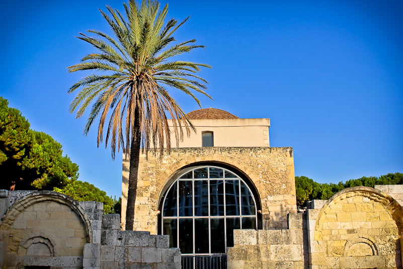 Basilica di San Saturnino - MIBAC This is a photo of a monument which is part of cultural heritage of Italy.